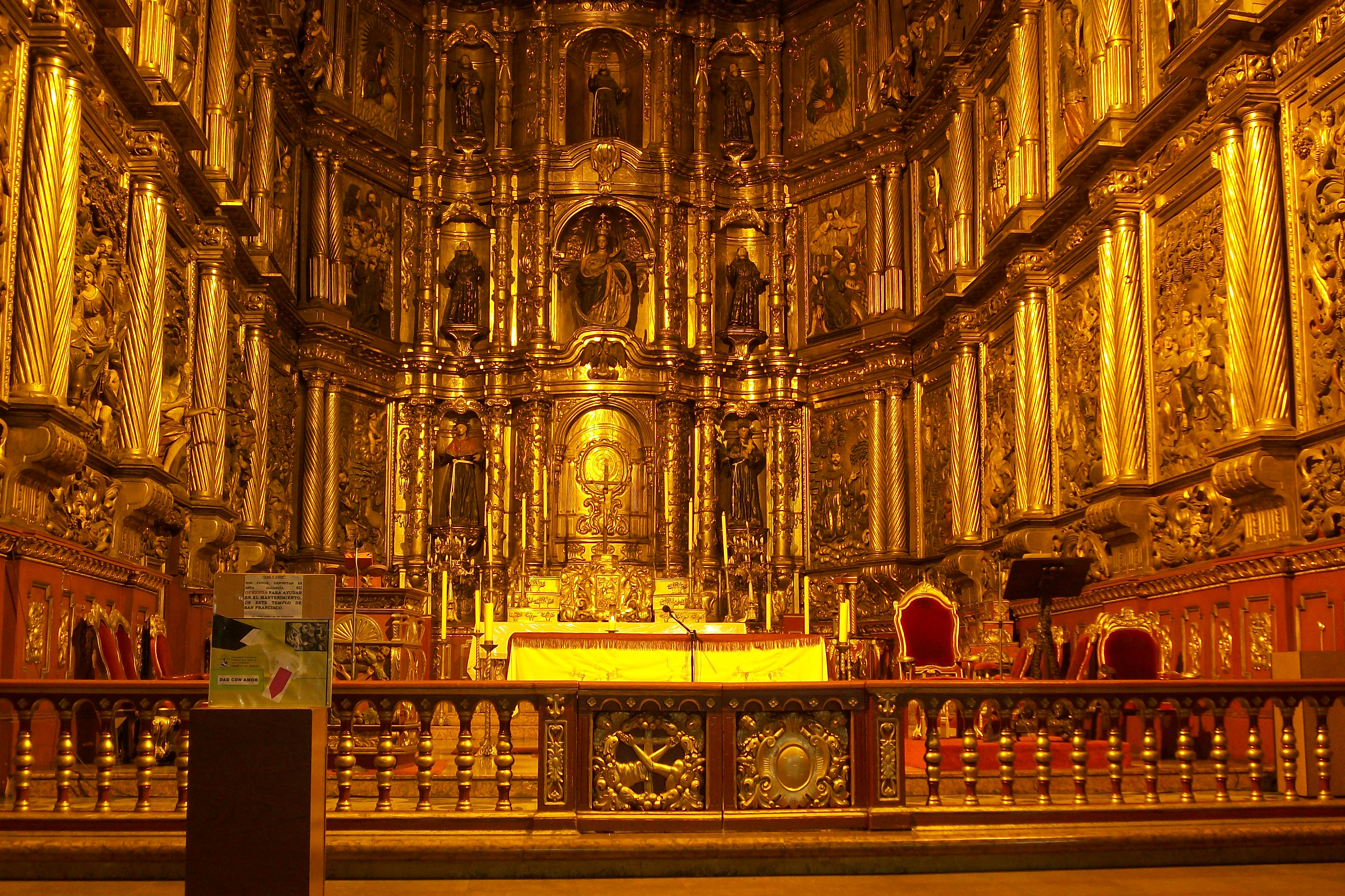 Interior de la iglesa de San Francisco, en Bogotá.